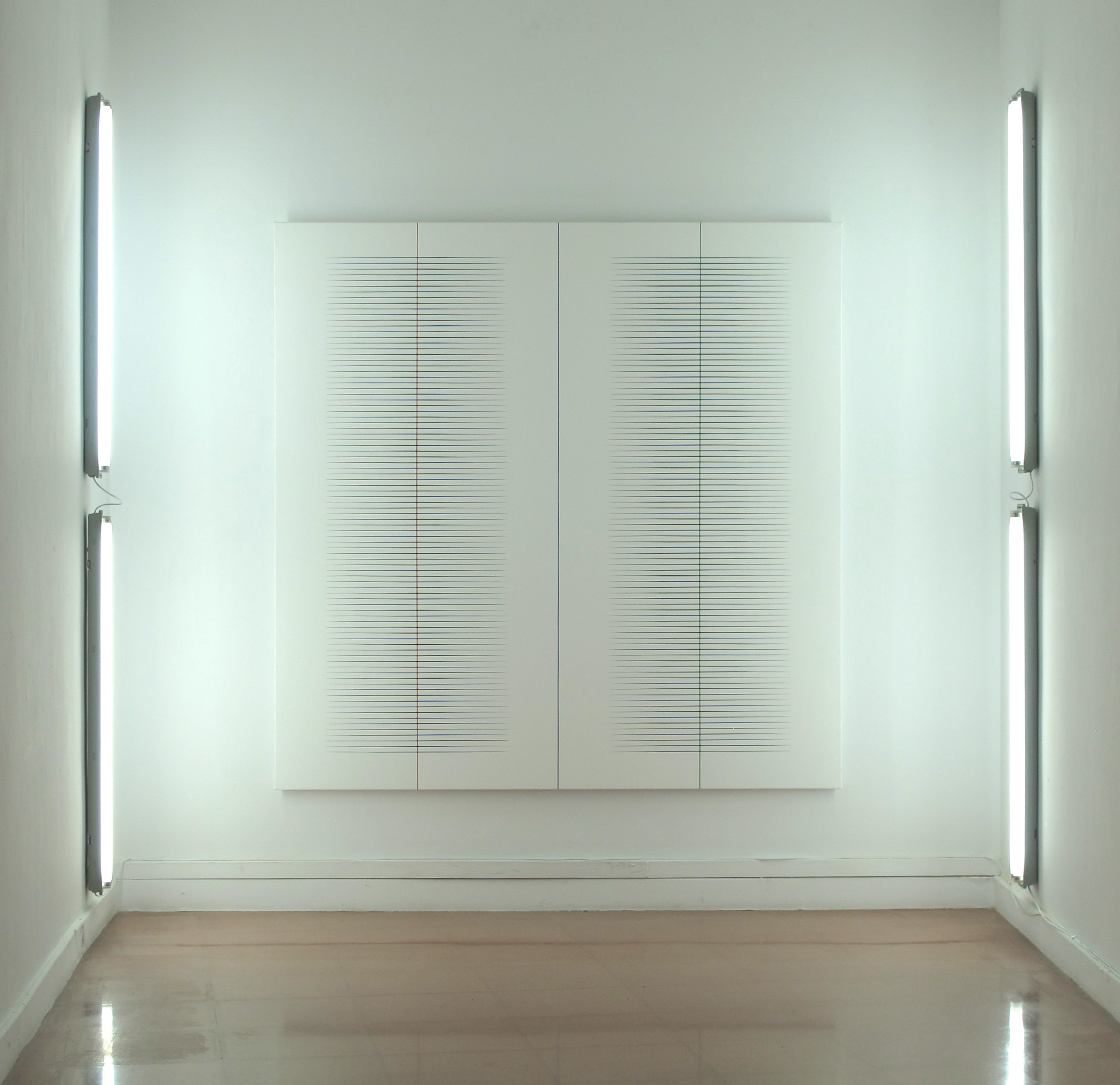 Instal·lació de pintura i llum a l'exposició '4: Michelle Héon, Gilles Morissette, Francesc Bordas, Glòria Massana', Biblioteca Pública de Lleida, 2014